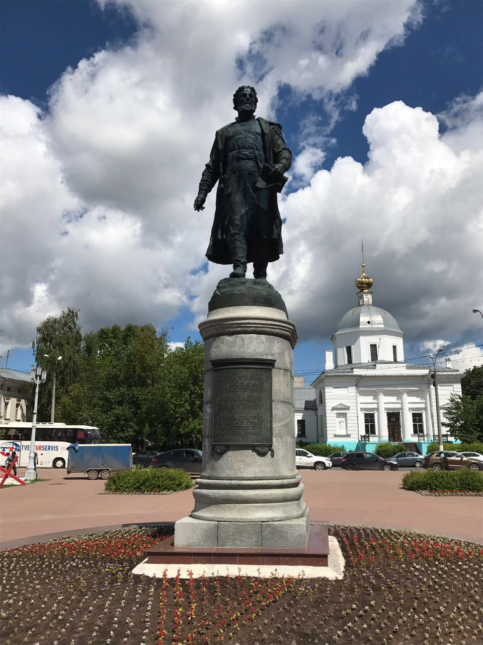 Twer In Russia